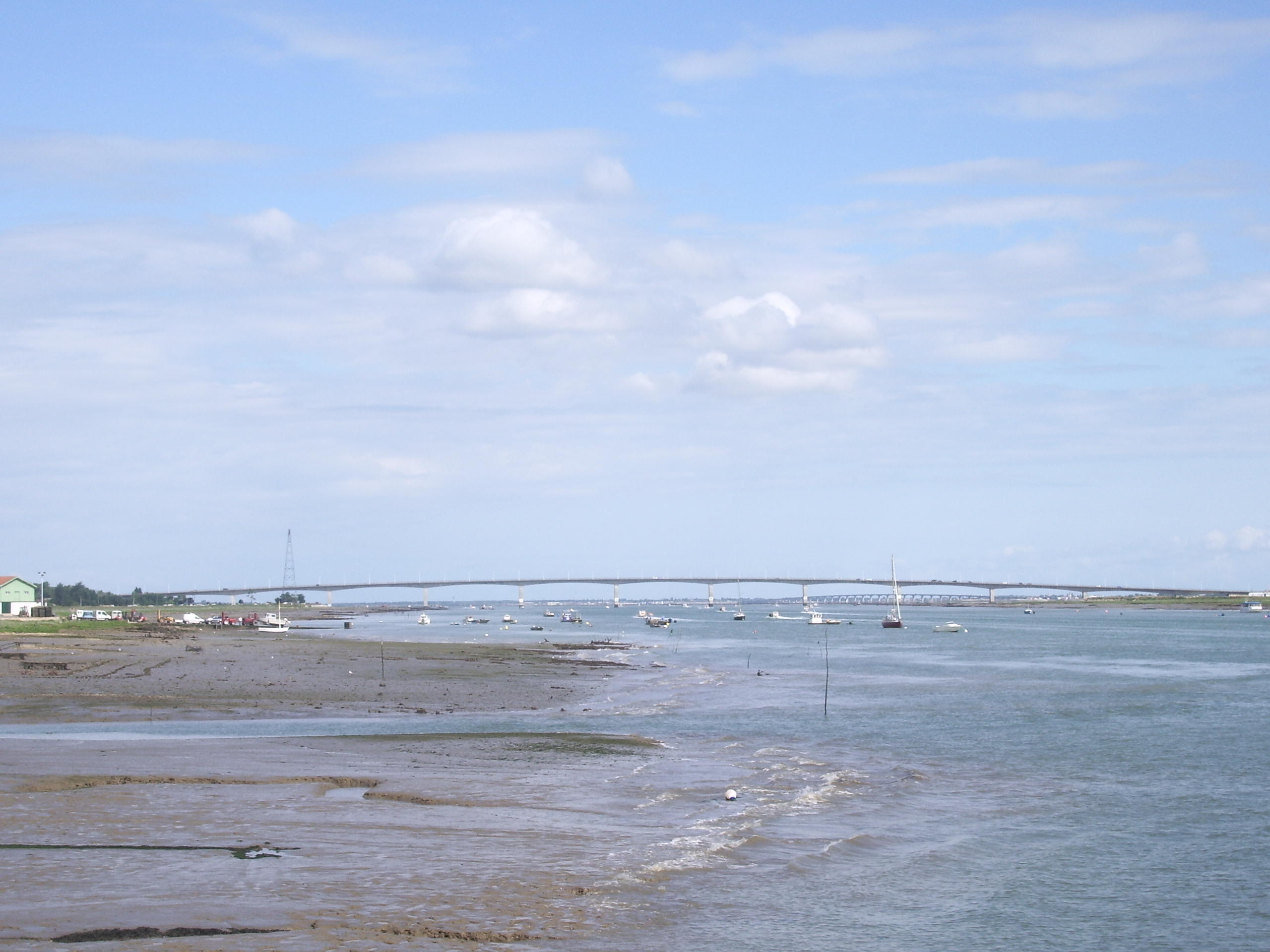 Pont sur la Seudre vue de La Tremblade, Charente-Maritime, France